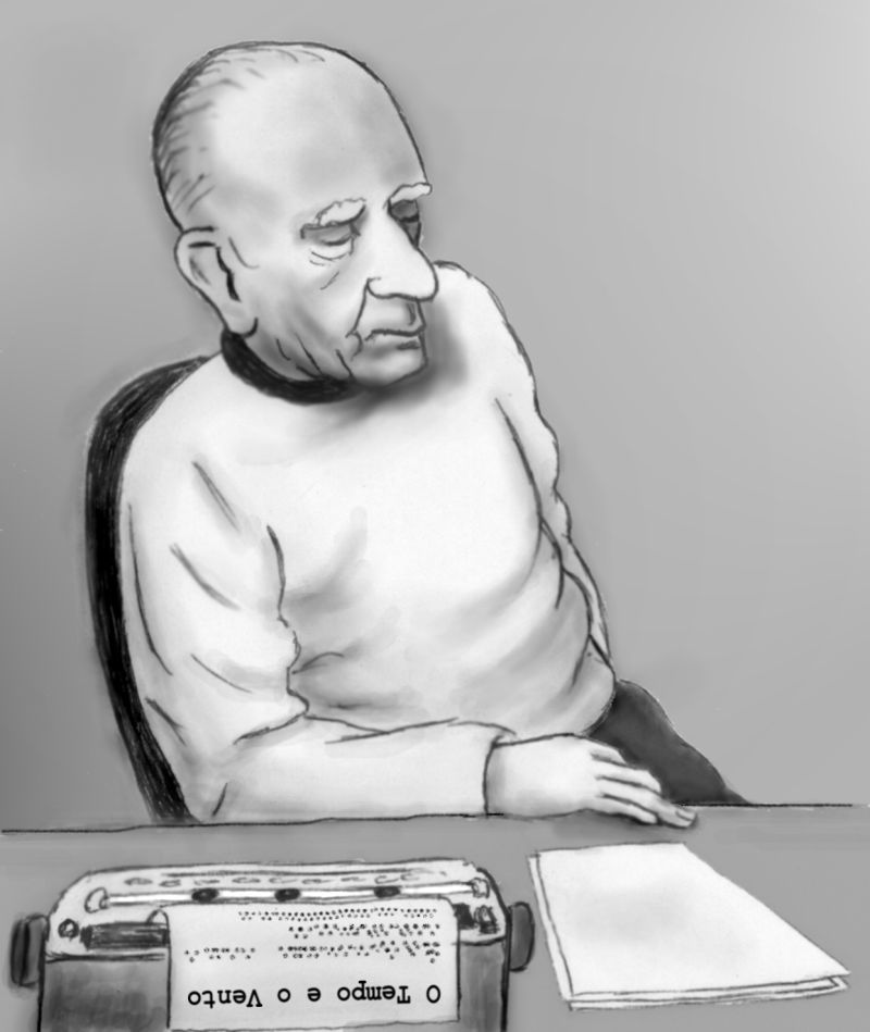 Desenho feito por André Koehne, lembrando o escritor brasileiro Érico Veríssimo.